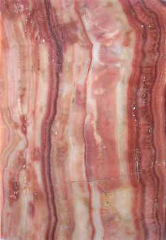 Kalksinter Böttingen (BW)